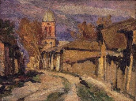 paisaje del pintor Juan Francisco González